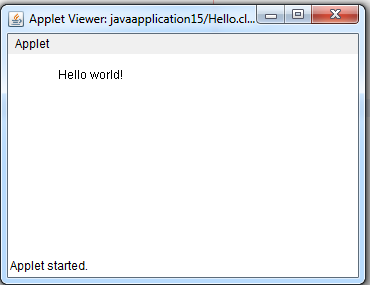 هذا هو البريمج الناتج